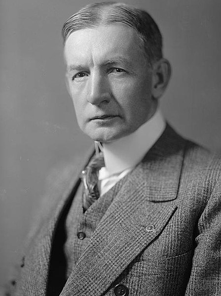 Charles G. Dawes